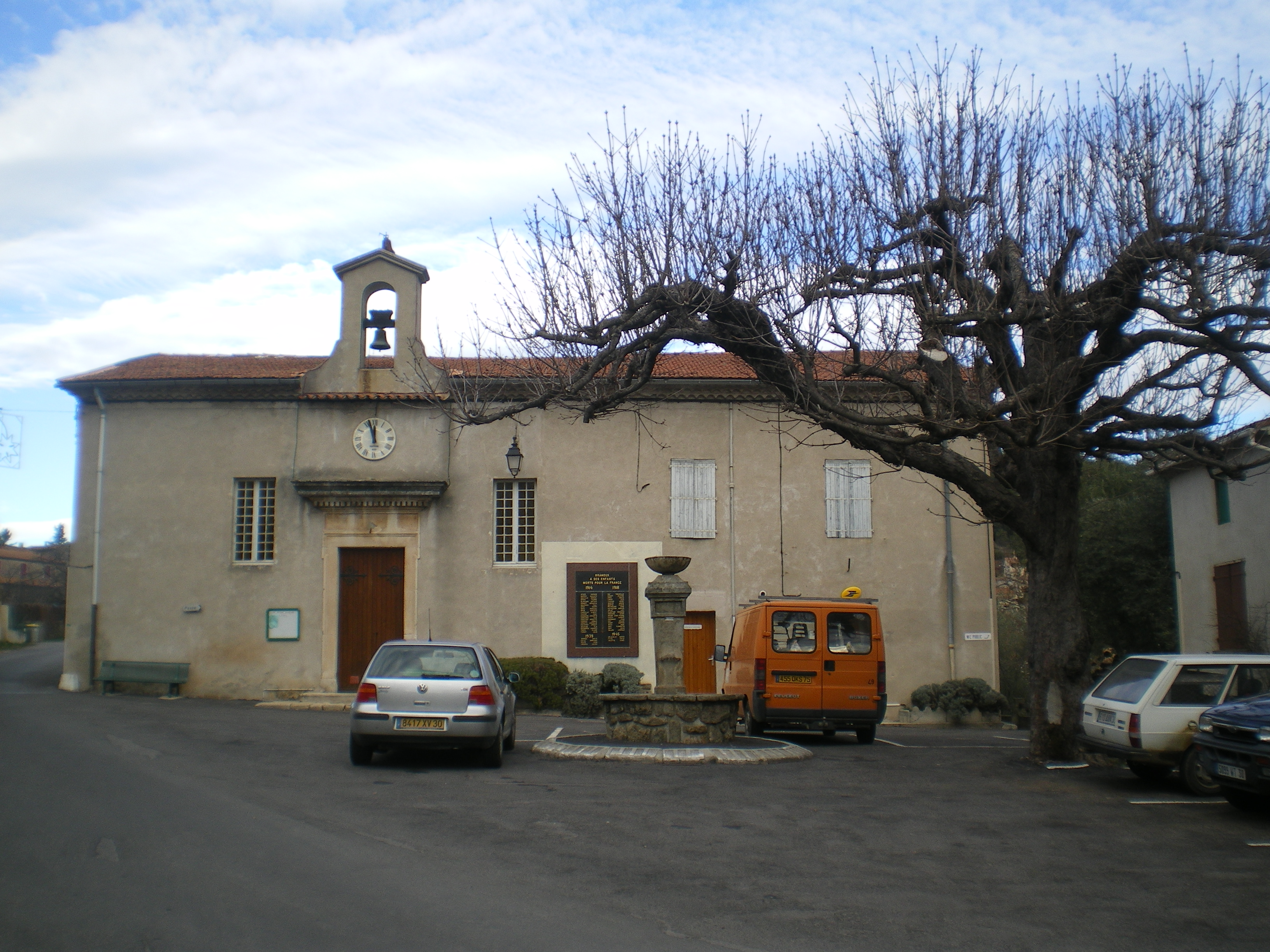 Temple de Branoux-les-Taillades (Gard, France).